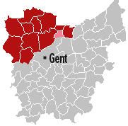 locatie Meetjesland, bewerking van kaartje Gebruiker:LennartBolks